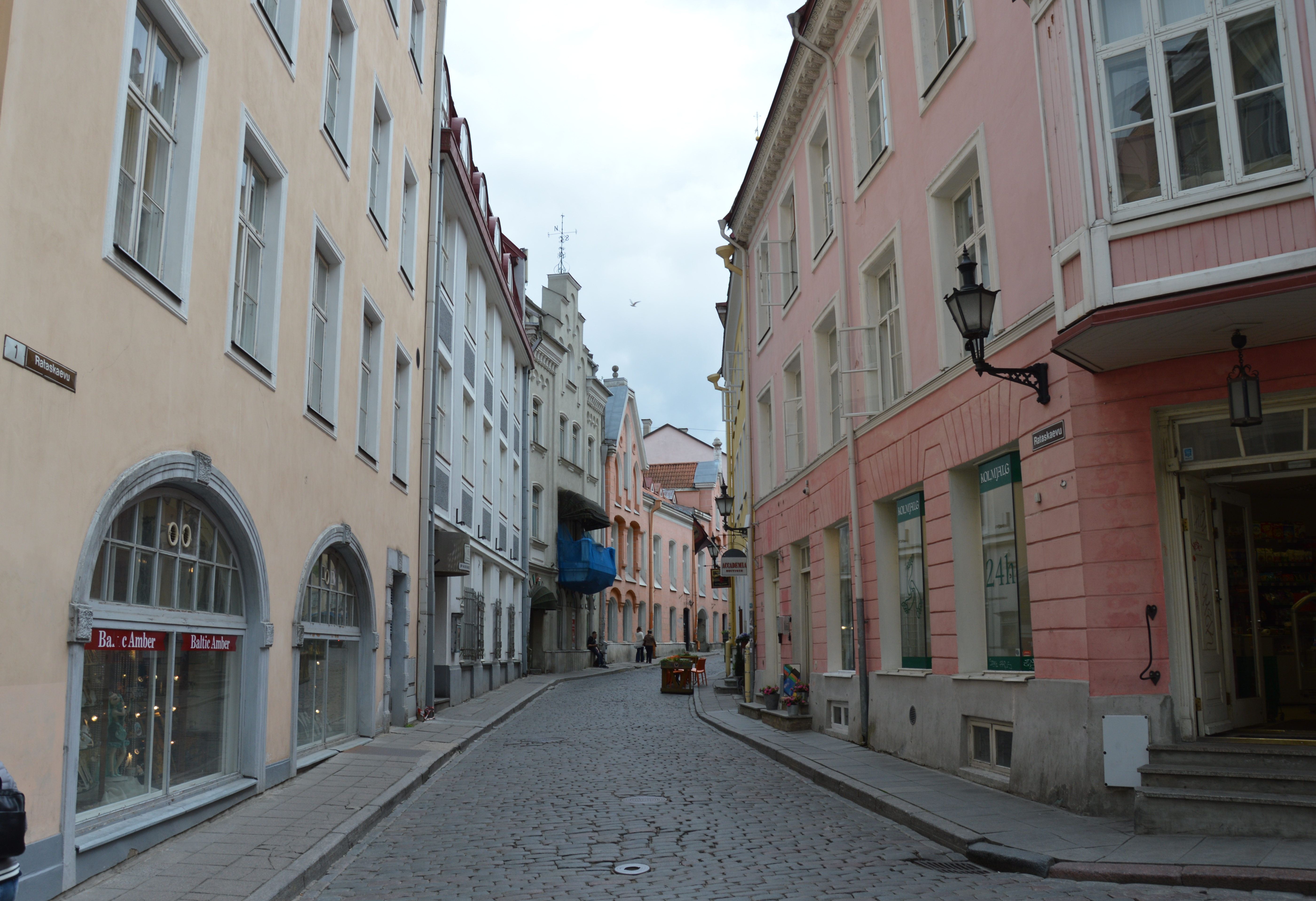 Raderstraße 2018 Blick von Norden